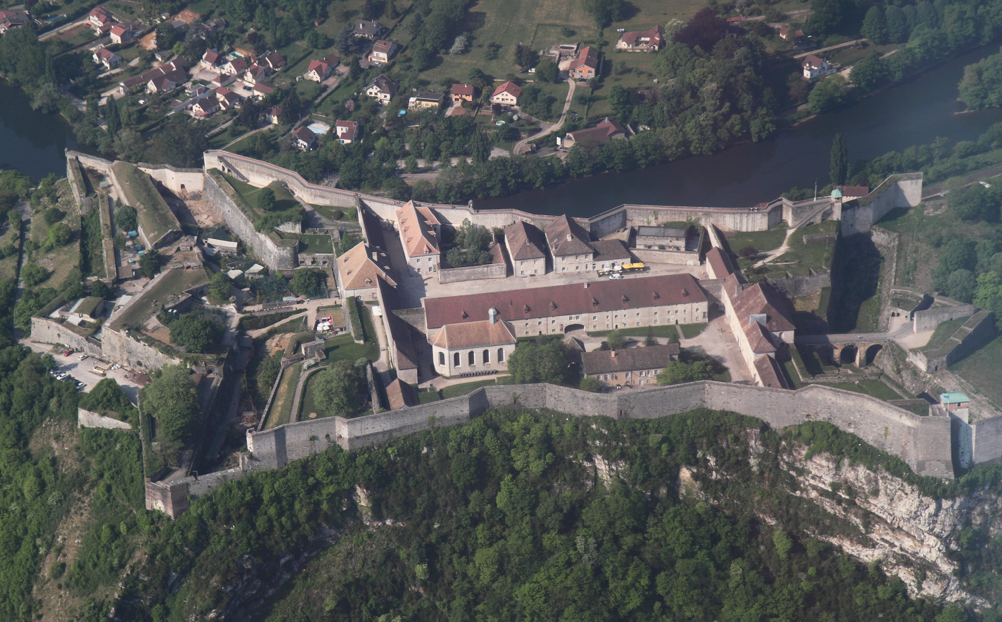 Vue aérienne de la citadelle Vauban, à Besançon. Le front Saint-Etienne et la ville sont à droite de la photo (non visibles)